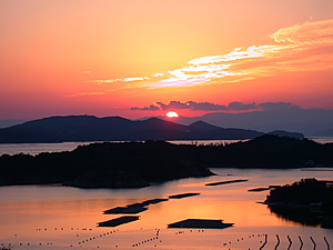 Sunset in Ago Bay